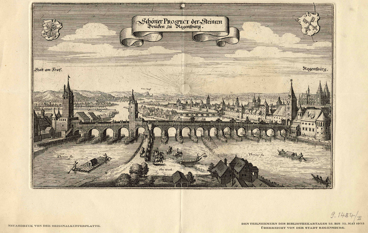 Schöner Prospect der Steinern Brücken zu Regenspurg, Kupferstich des 18. Jh., Neuabdruck von der Originalplatte als Widmung für den Bibliothekartag 1923